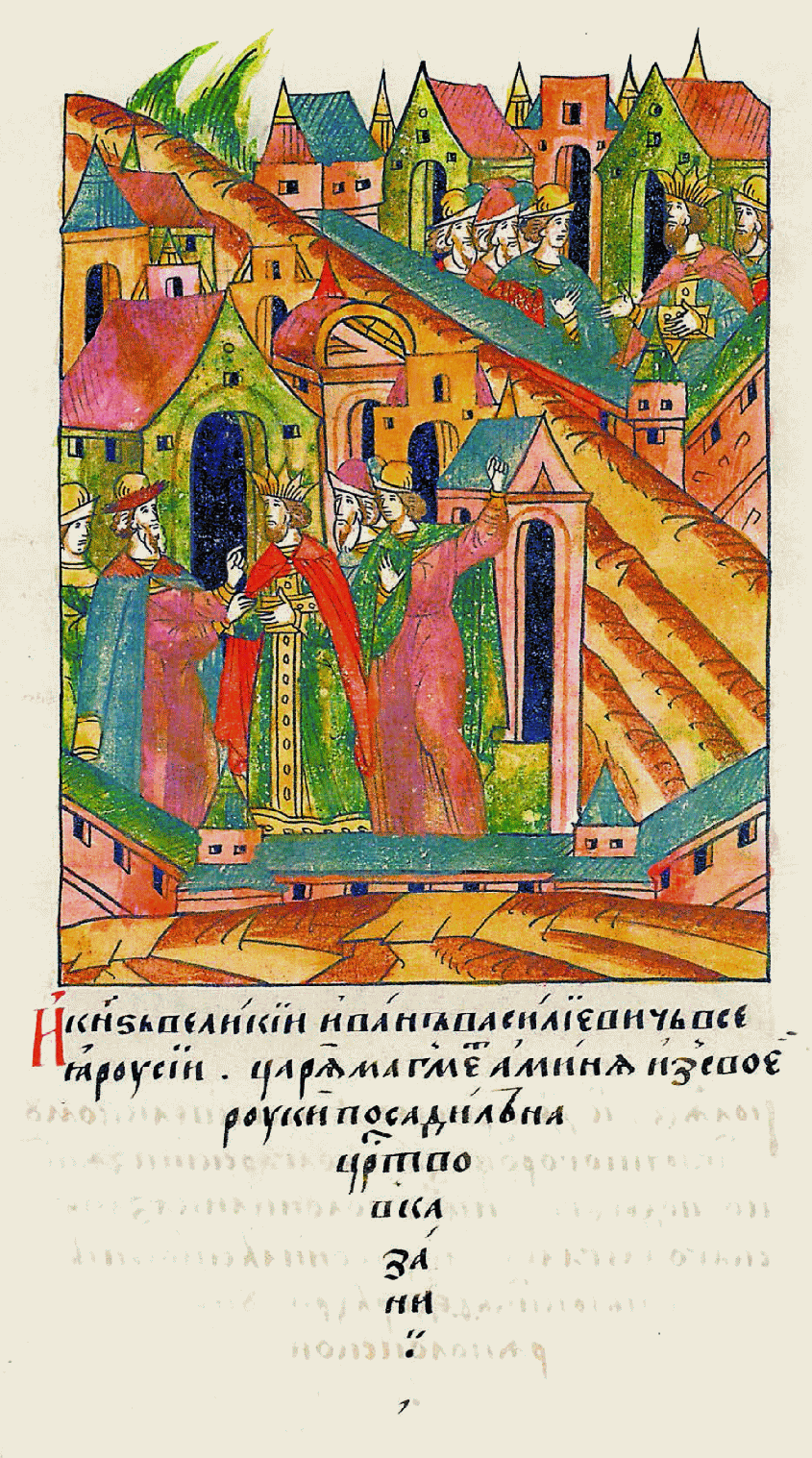 И великий князь Иван Василье- вич всея Руси царя Магамет-Амина по своей воле посадил на царство в Казани